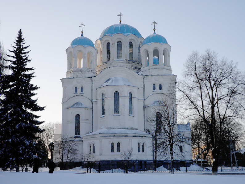 Трьоханастасіївська церква, Глухів, вул. Дзержинського, 2. Спаська, 2